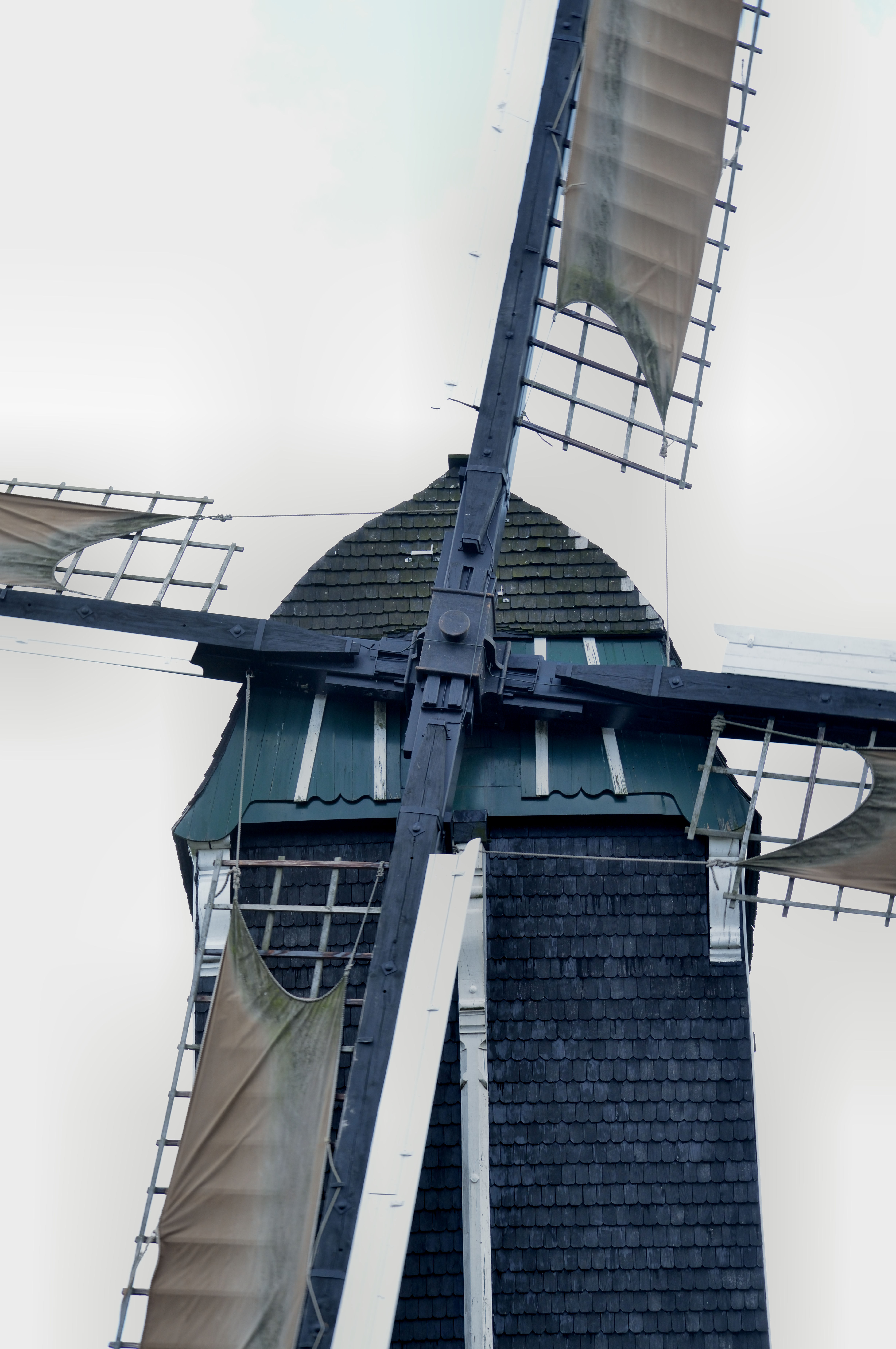 Wissink's Möl, Enschede